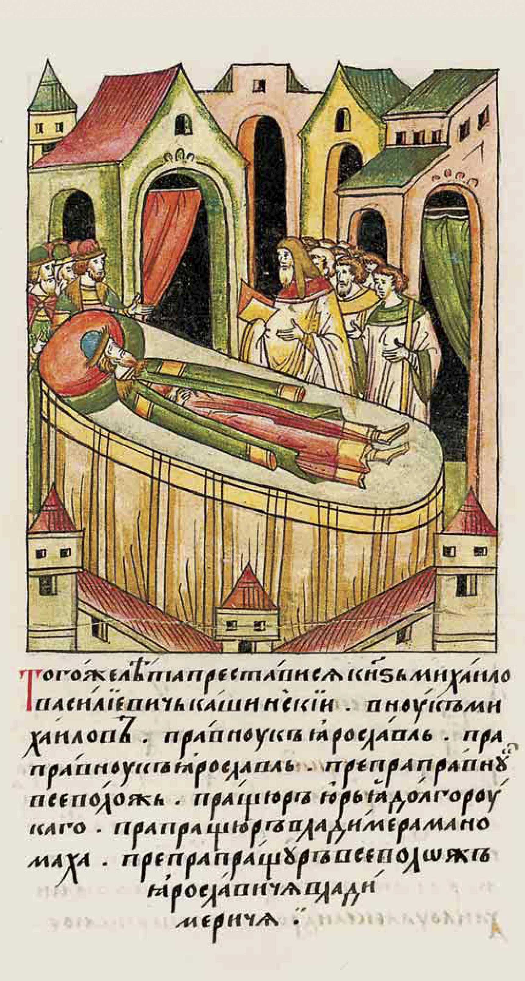 ЛИЦЕВОЙ ЛЕТОПИСНЫЙ СВОД В том же году преставился князь Михаил Васильевич Кашинский, внук Михайлов, правнук Ярослава, праправнук Ярослава, препраправнук Всеволода, [потомок] пращура Юрия Долгорукого, прапращура Владимира Манамаха, препрапращура Всеволода, Ярослава, Владимира.